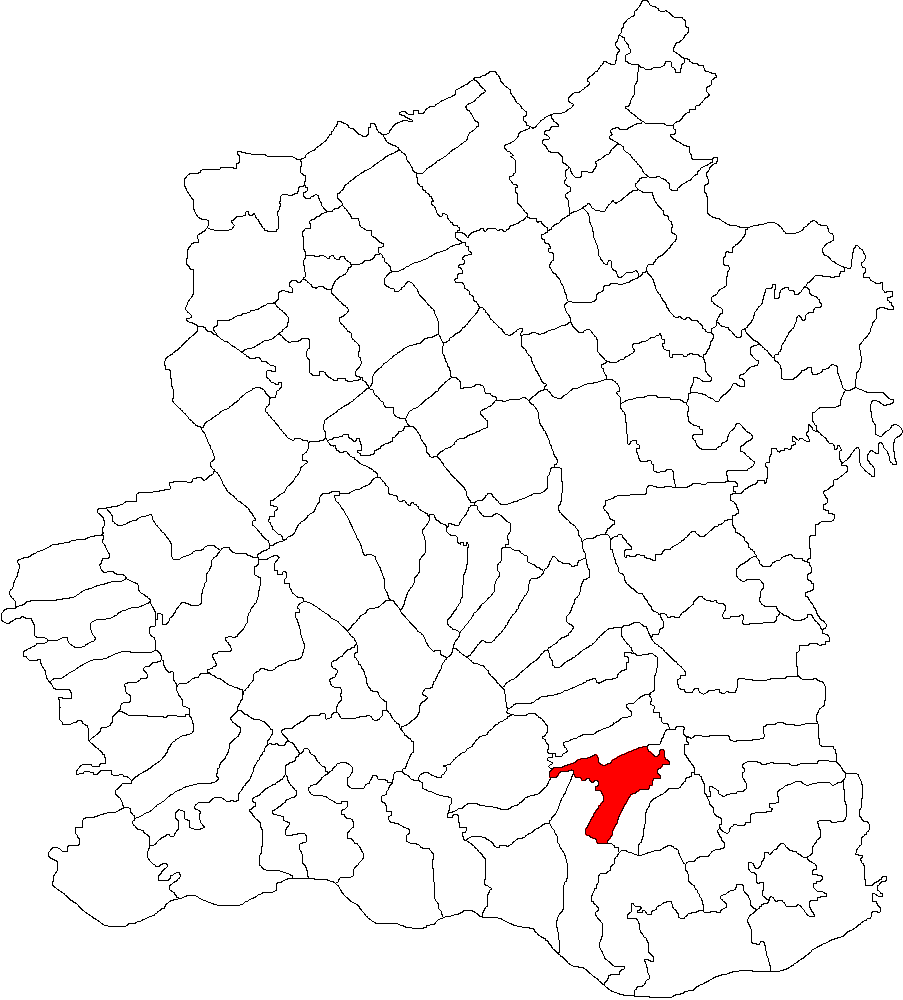 Categorie:Hărţi ale judeţului Teleorman